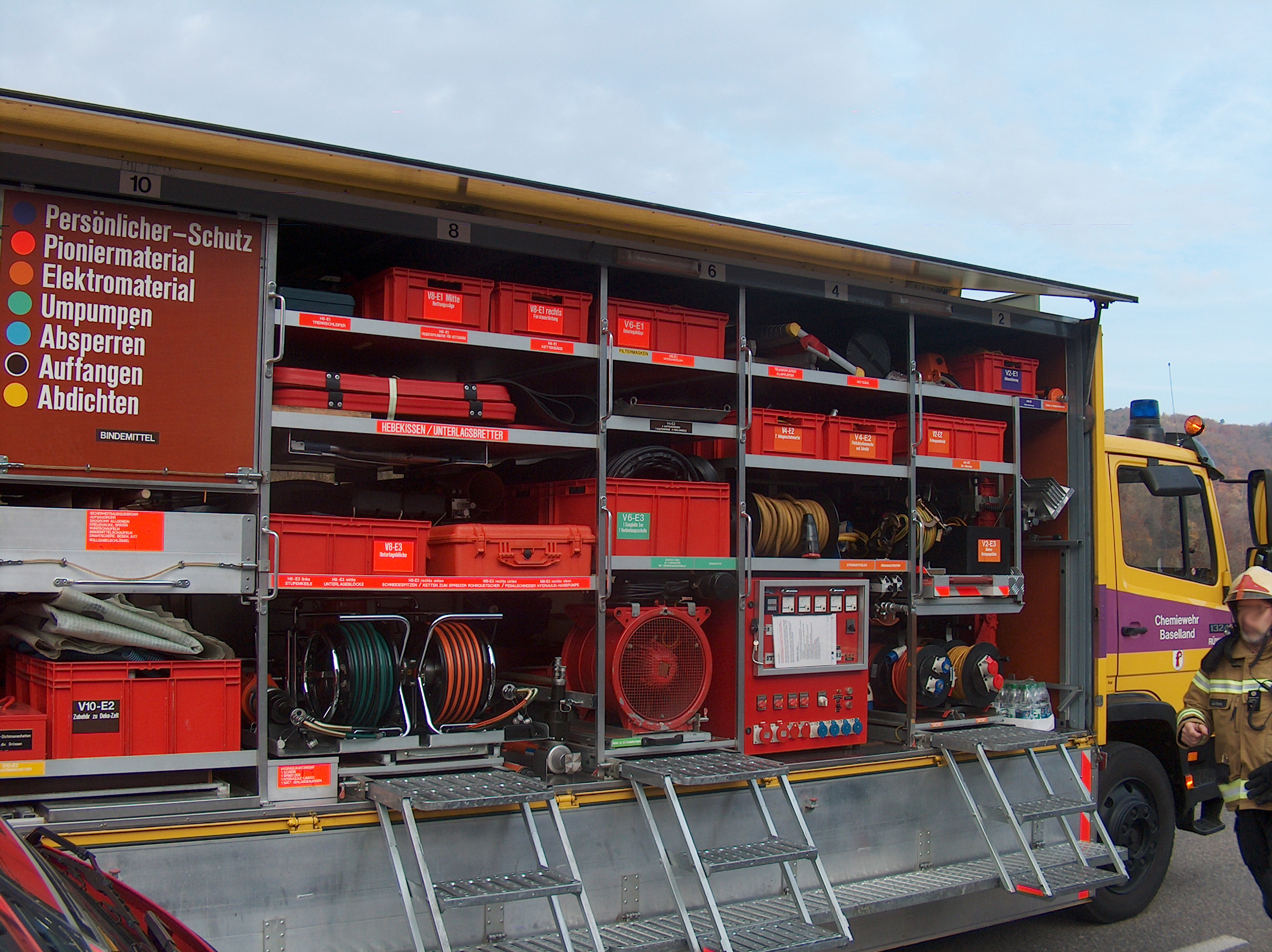 Detailansicht Rüstwagen der Chemiewehr Basel-Landschaft an der Hauptübung "Senza Limiti" der Stützpunktfeuerwehren Liestal und Sissach, der Feuerwehr Lausen, der Betriebswehr der SBB, der Chemiewehr und des Katastrophenschutzes, in Lausen, Höhe alter Bahnhof/Güterterminal.